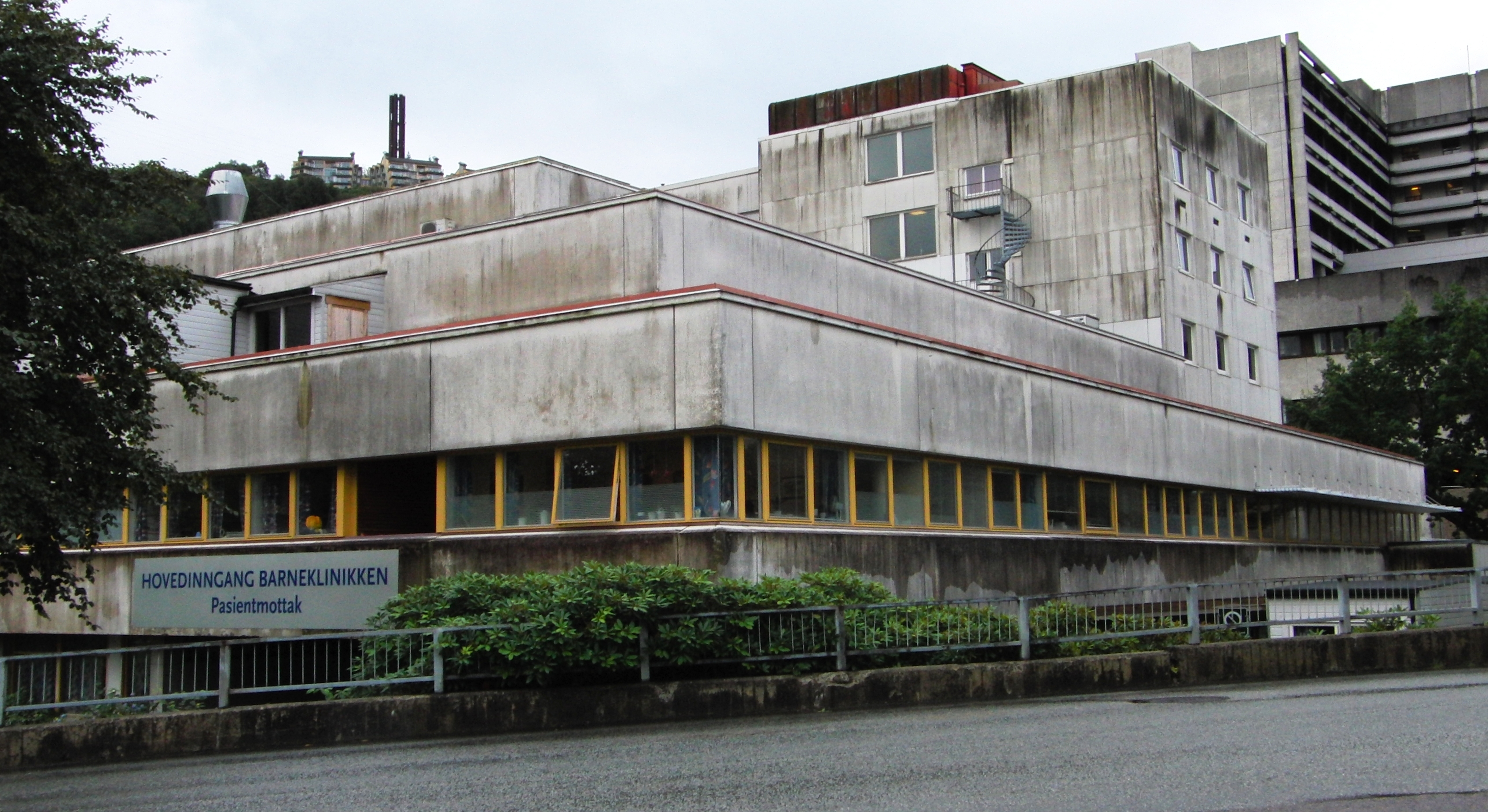 Description=Barneklinikken (Haukeland Universitetssykehus)